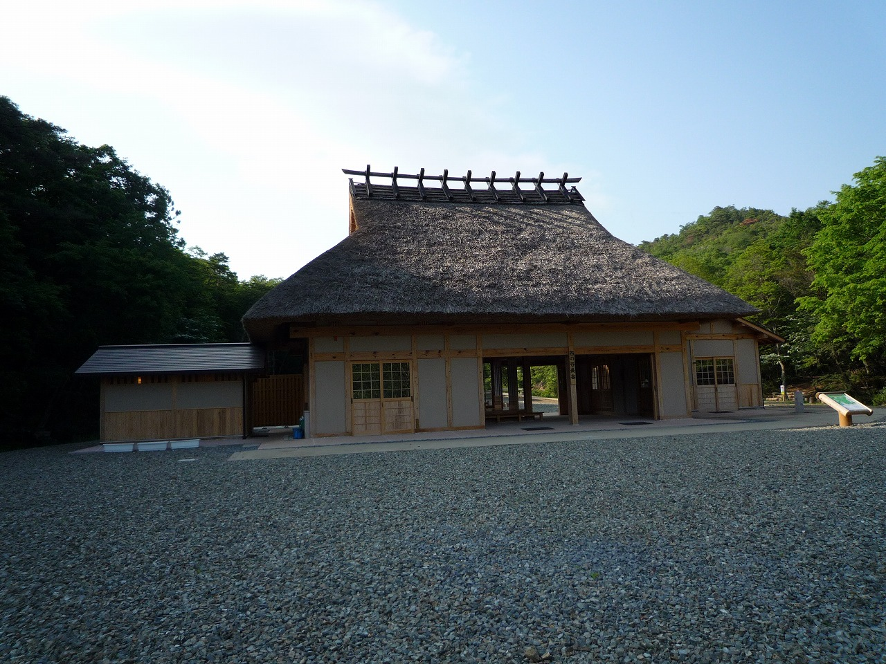 兵庫県立宝塚西谷の森公園西の谷農舎